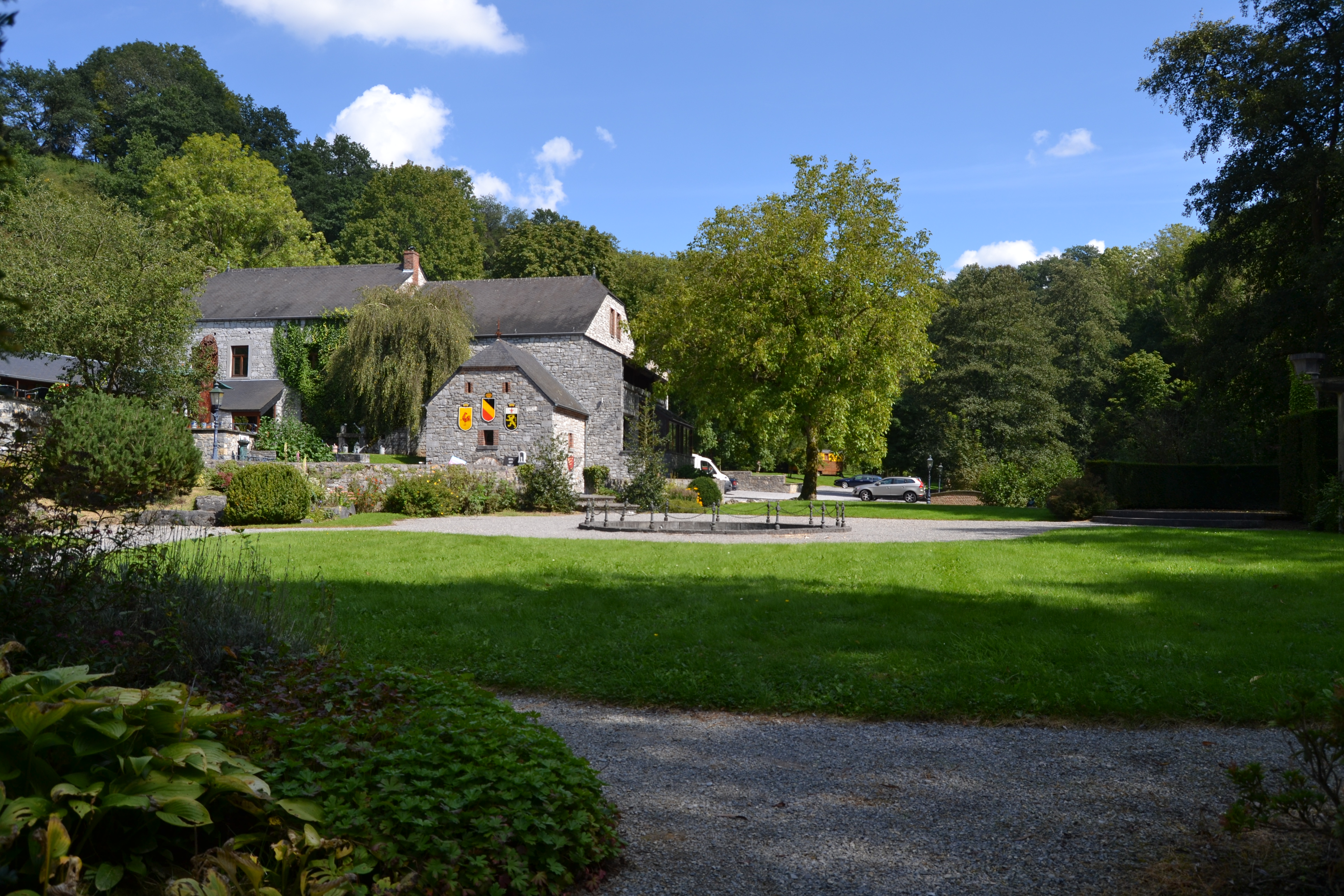 Vue du Moulin de Lisogne: un cadre exceptionnel dans une nature préservée, calme et traversée par la rivière Leffe